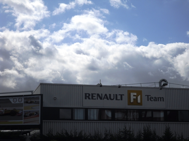 Le siège de Renault F1 Team à Viry-Châtillon (91)